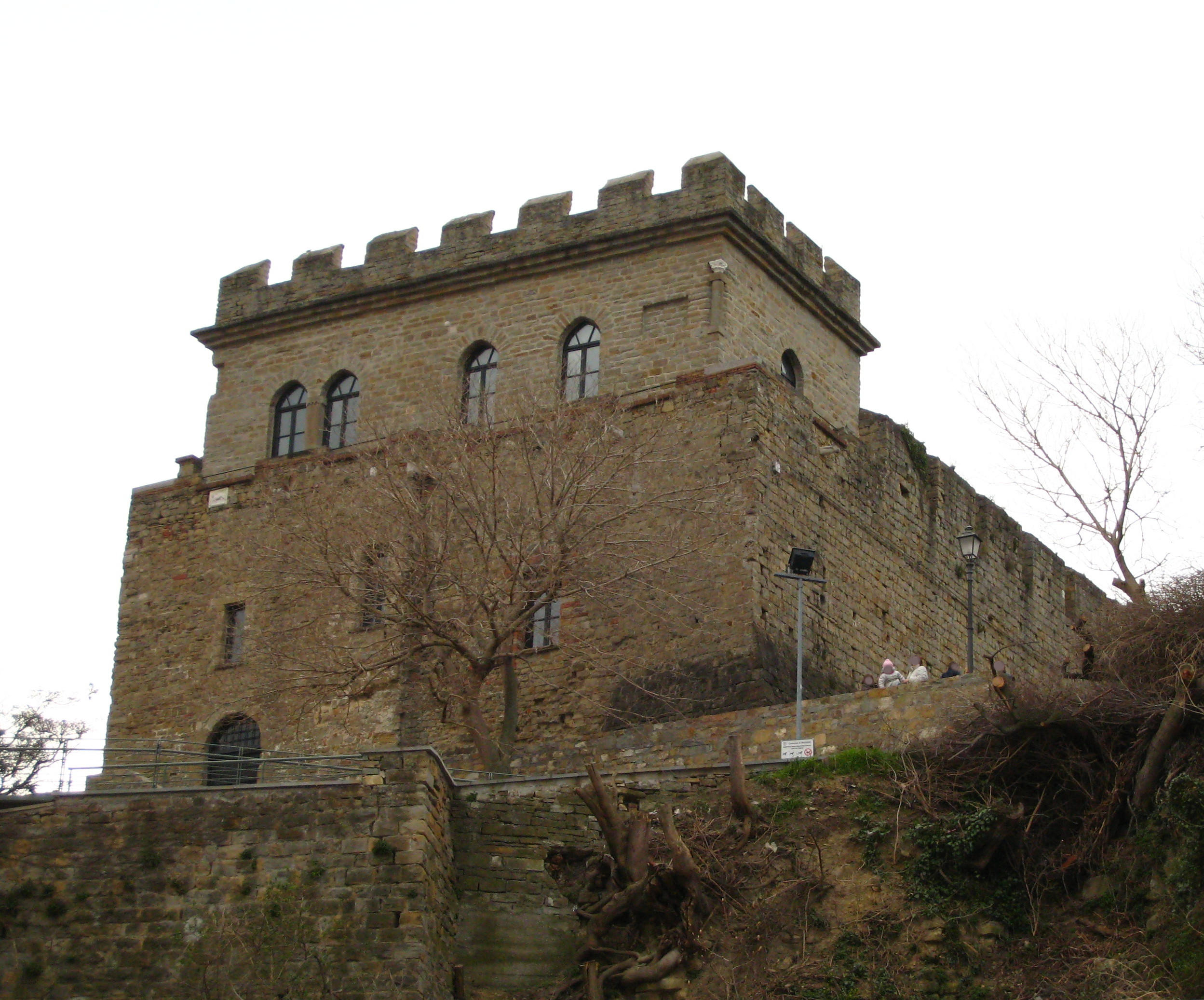 Il Castello di Muggia - Italia.